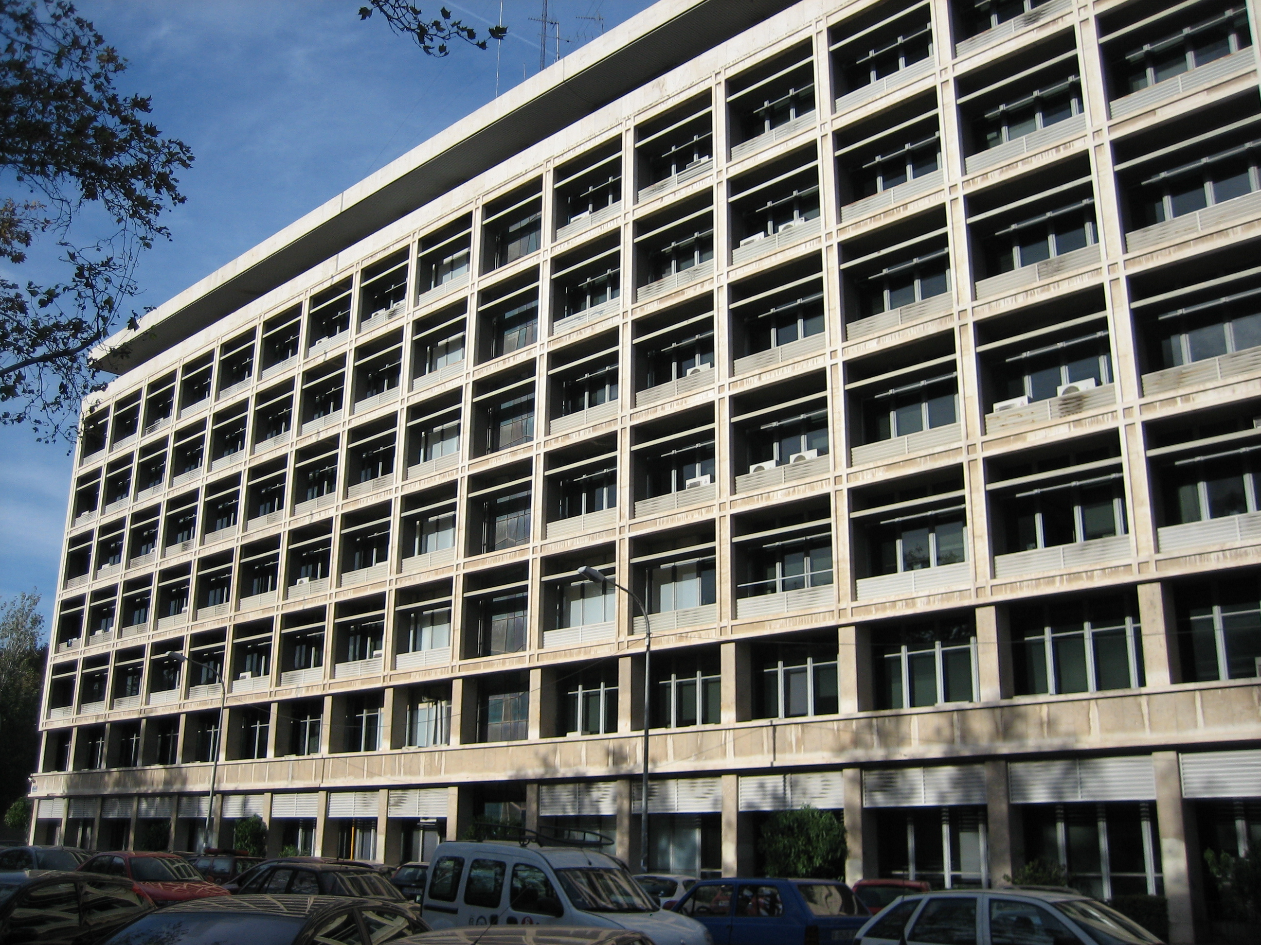 Edificio de la Confederación Hidrográfica del Júcar, en Valencia, avenida Blasco Ibáñez.